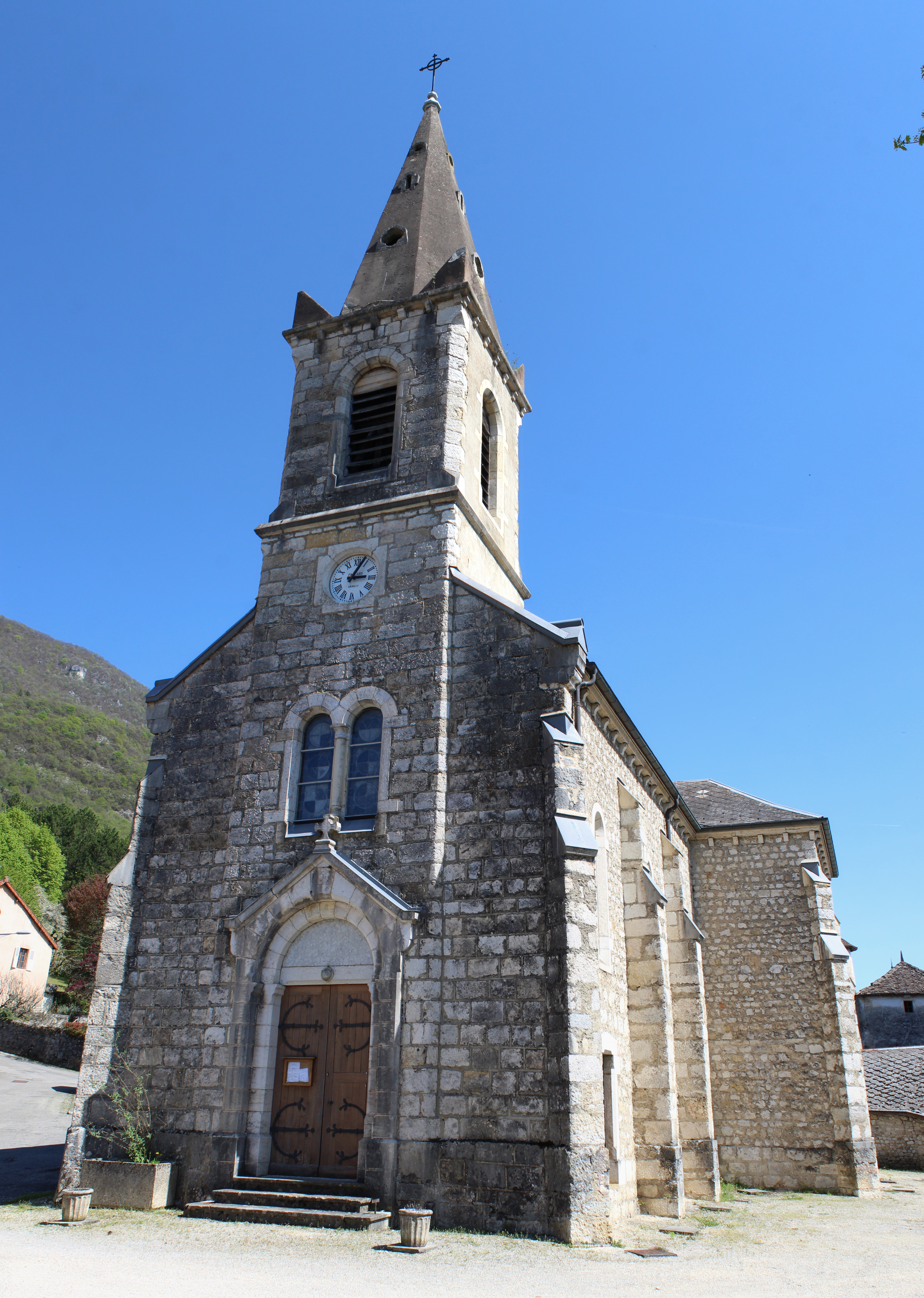 Église Saint-Christophe de Talissieu.